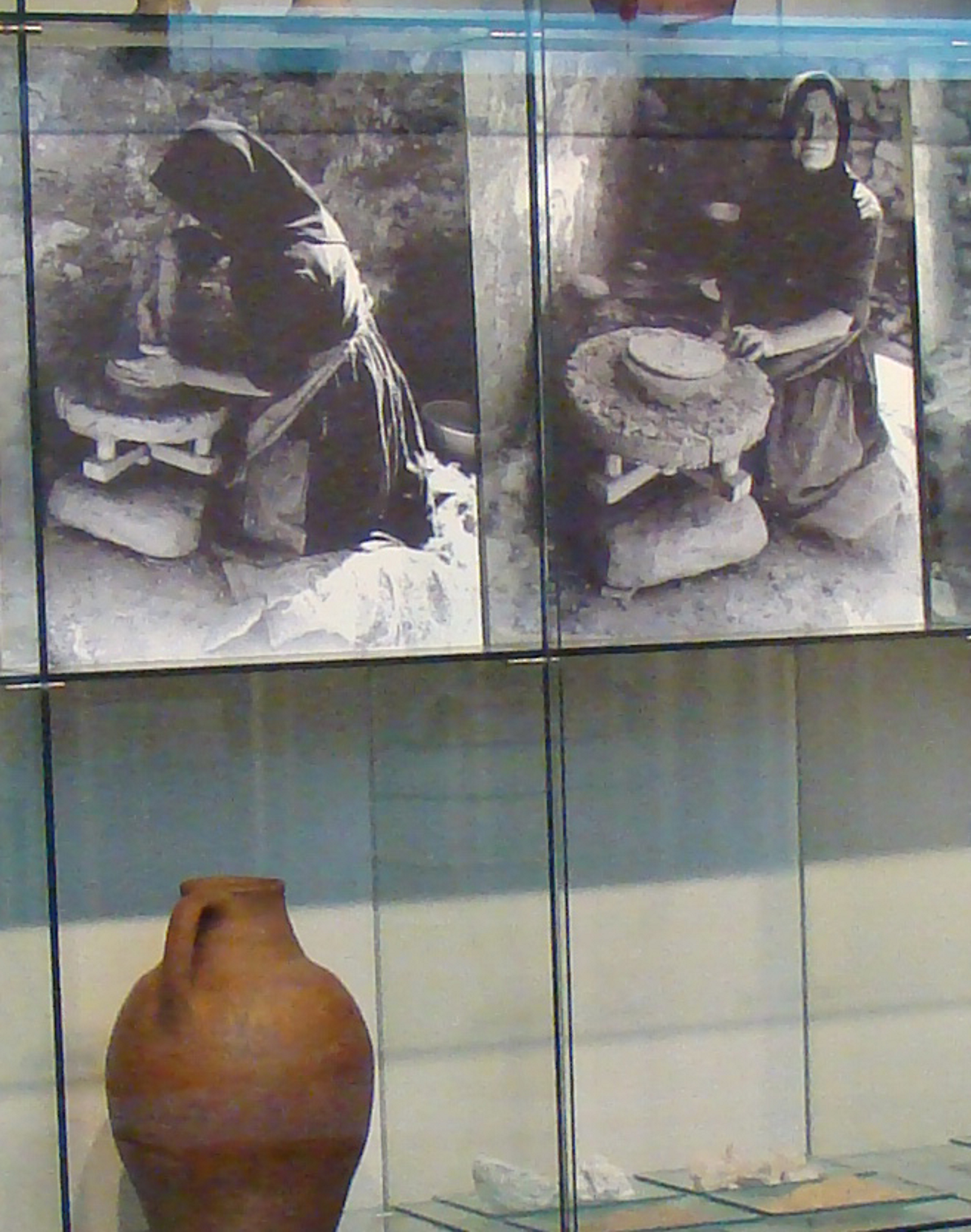 La alfarería es una actividad tradicionalmente realizada por la mujer en algunas localidades del noroeste de la península ibérica, como puede apreciarse en estas fotos del Museo etnográfico de Castilla y León, en Zamora. (Imagen obtenida modificando otra publicada en Wikimedia Commons).